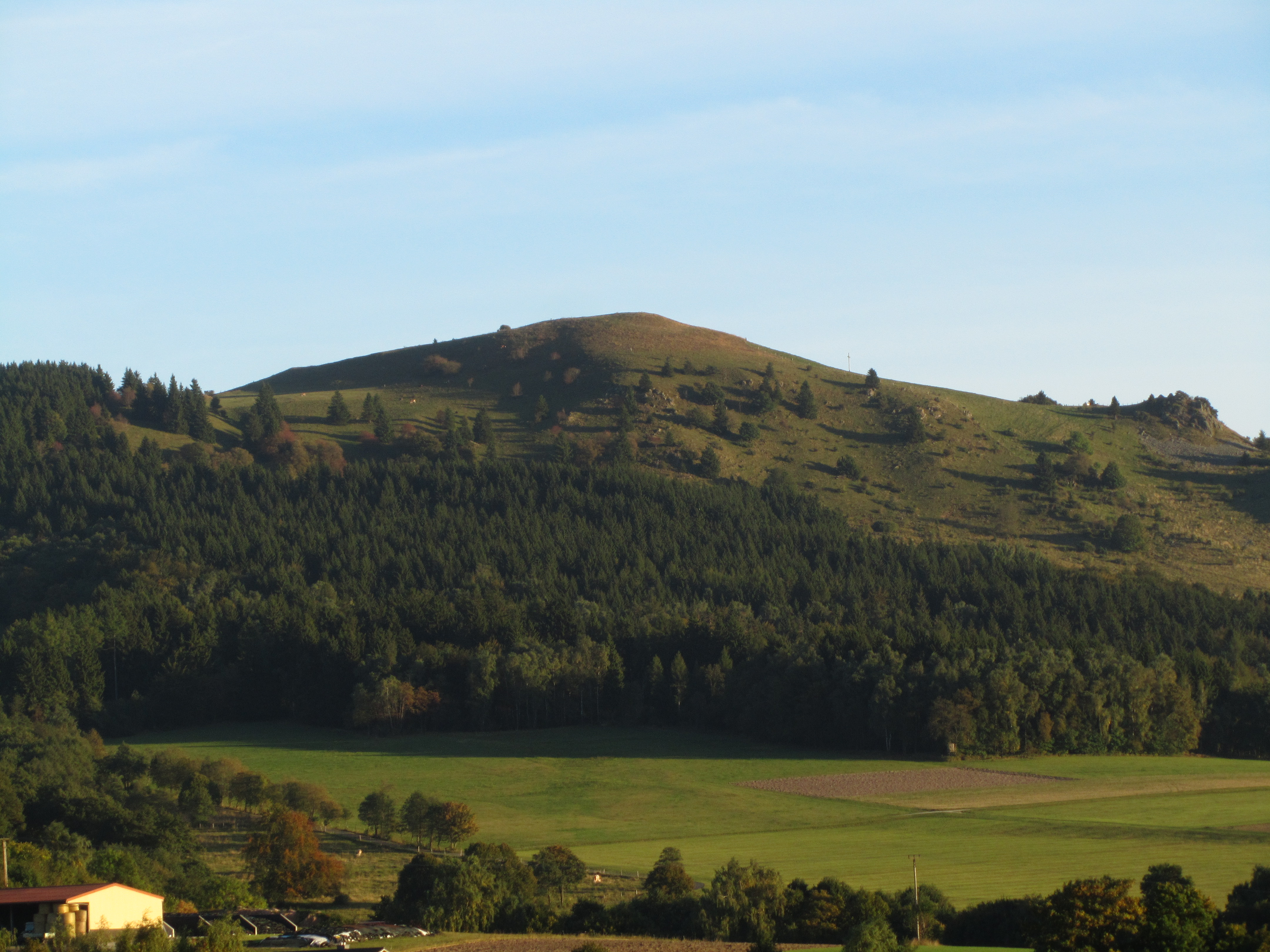 Der Pferdskopf in der Rhön von Norden